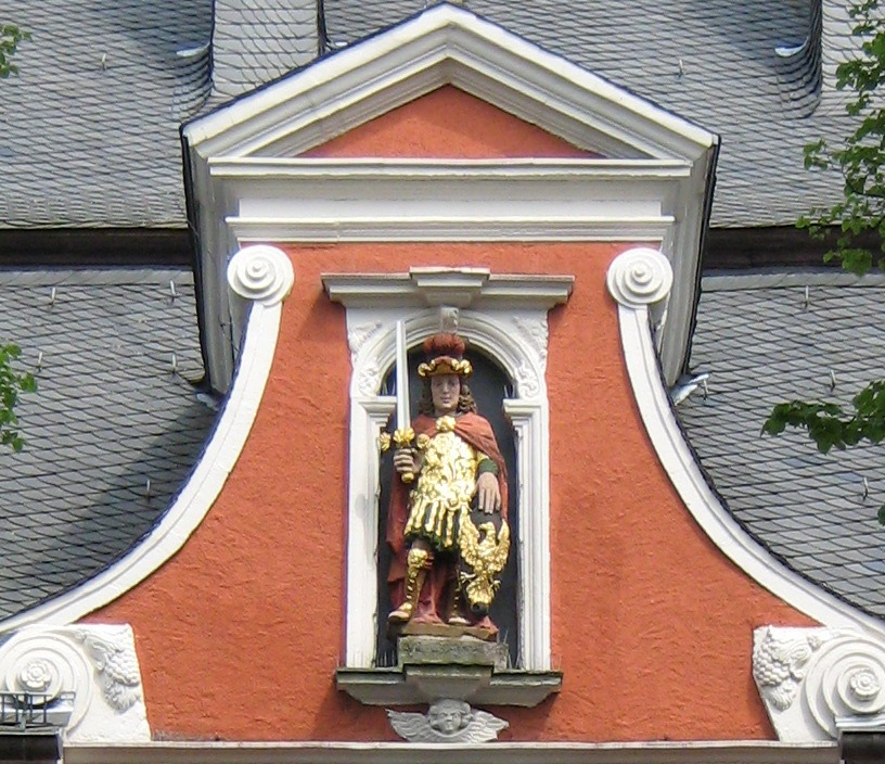 Patroklus als Schutzpatron der Stadt Soest (barocke Darstellung, 18. Jhdt., Mittelgiebel der westlichen Rathausfront). Zur Zeit der Gestaltung der Fassade war Soest weitgehend evangelisch-lutherischer Konfession.